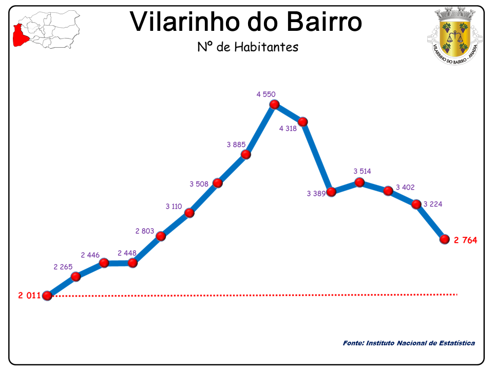 Freguesia